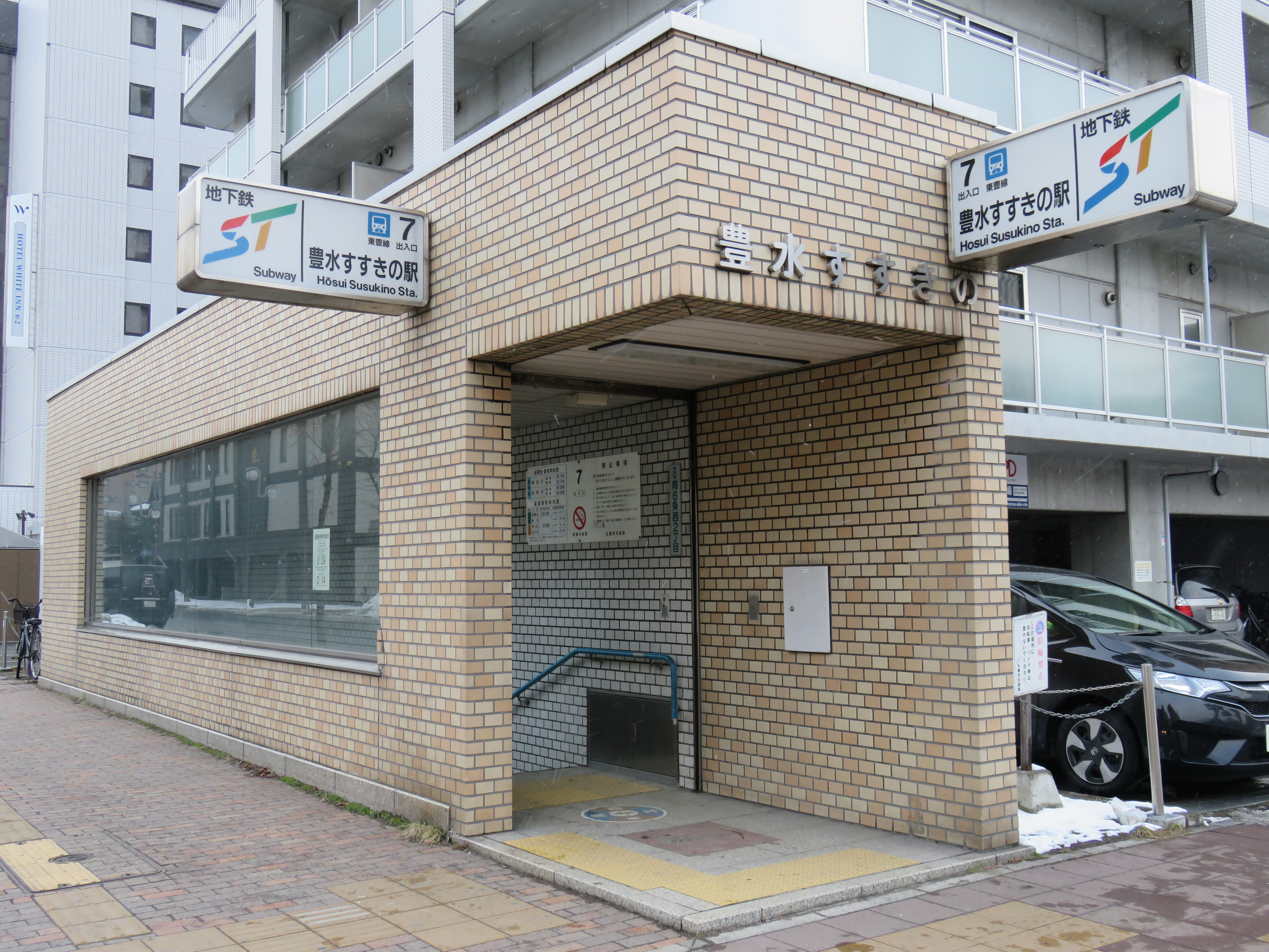 豊水すすきの駅7番出入口